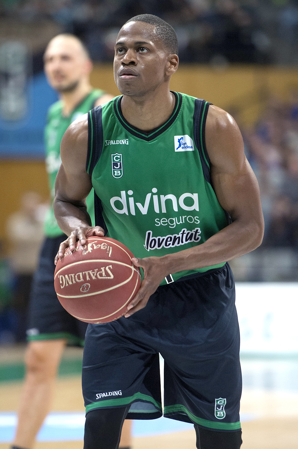 Terry Smith en un partit de l'ACB 2016-17 amb el Club Joventut Badalona